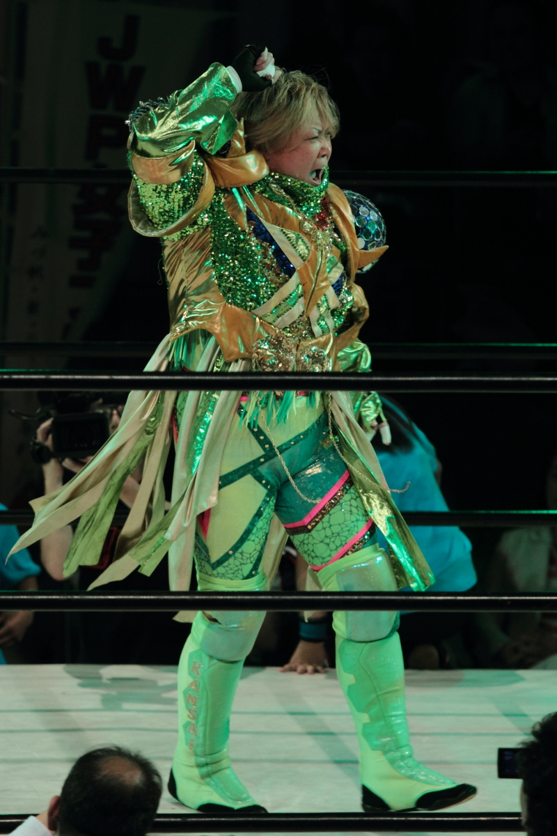 2015年08月16日 JWP後楽園ホール大会